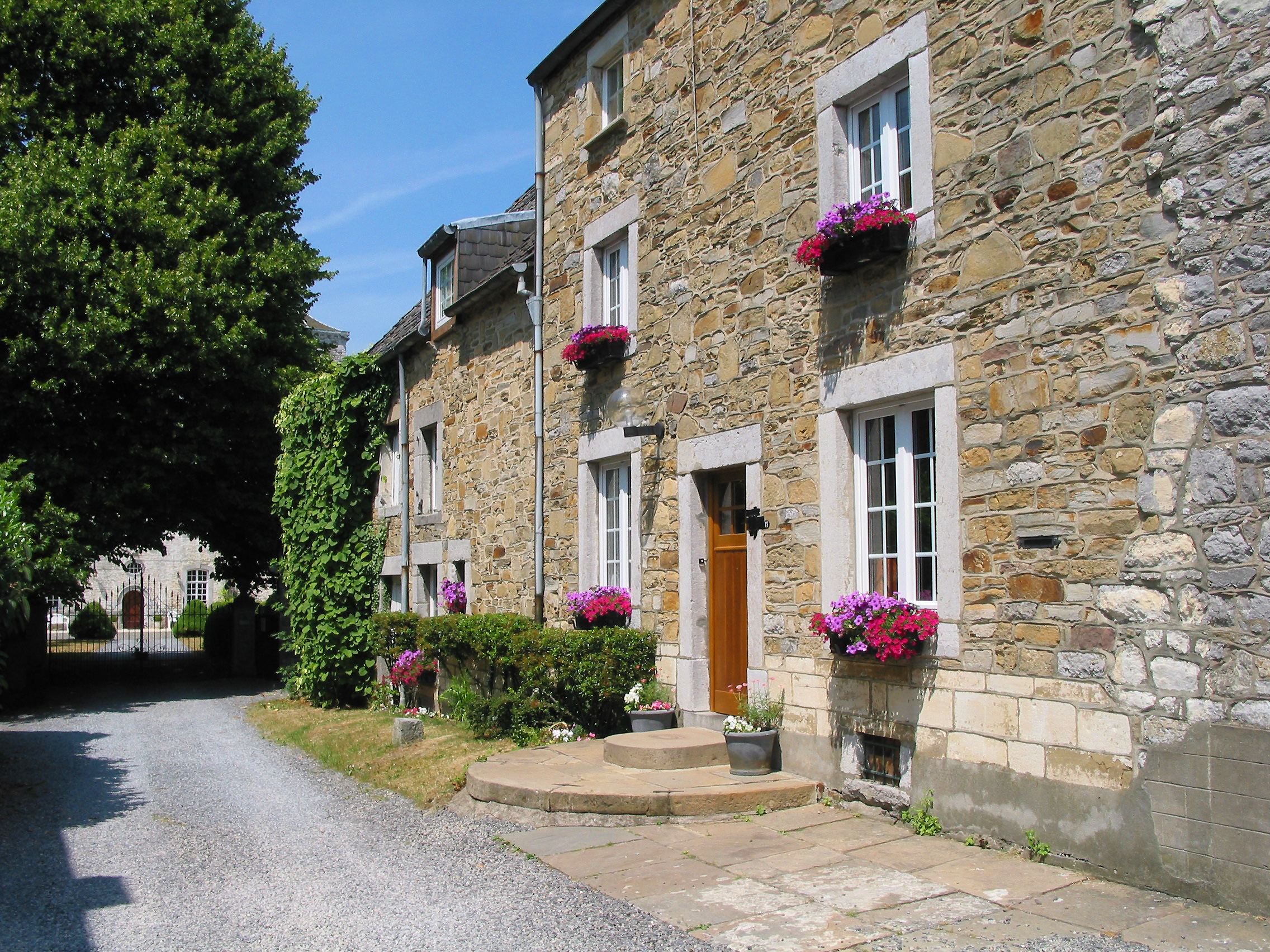 Villers-le-Temple (Belgique), maison régionale typique.